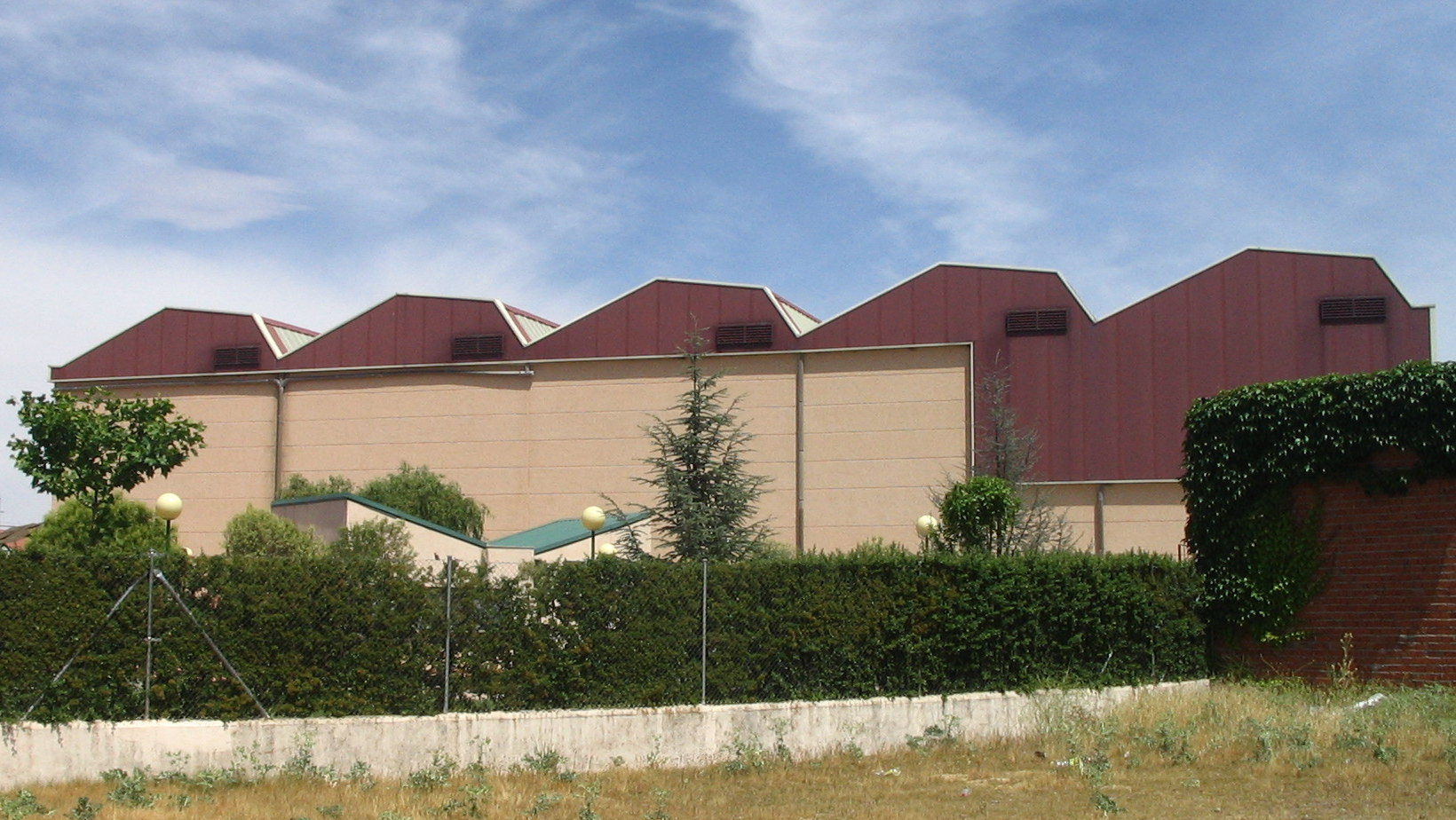 Vista del Pabellón municipal de Macotera y del parque.